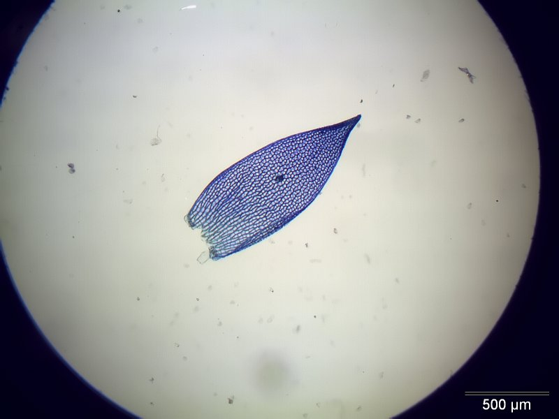 Sphagnum fimbriatum, Astblatt, 40x